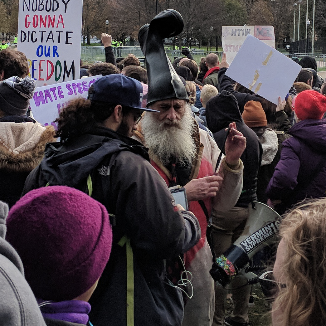 Maker:S,Date:2017-8-15,Ver:6,Lens:Kan03,Act:Lar02,E:Y